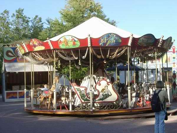 GNU-FDL Killesberg Stuttgart 2004- selbst fotografiert 8.9.2004